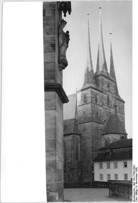 Erfurt, Severi-Kirche Zentralbild Wittig Gal-Gr 9.11.1960 Erfurter Baudenkmäler erstanden in alter Schönheit - Bedeutende Mittel für denkmalpflegerische Arbeiten bereitgestellt Für die systematischen denkmalpflegerischen Arbeiten in der Blumenstadt Erfurt, die reich an kulturhistorisch wertvollen Baudenkmälern der Vergangenheit ist, stellte die Regierung der Deutschen Demokratischen Republik in den vergangenen Jahren Millionen-Beträge zur Verfügung. UBz: Blick auf die Severikirche in Erfurt (Links ein Stück vom Erfurter Dom).